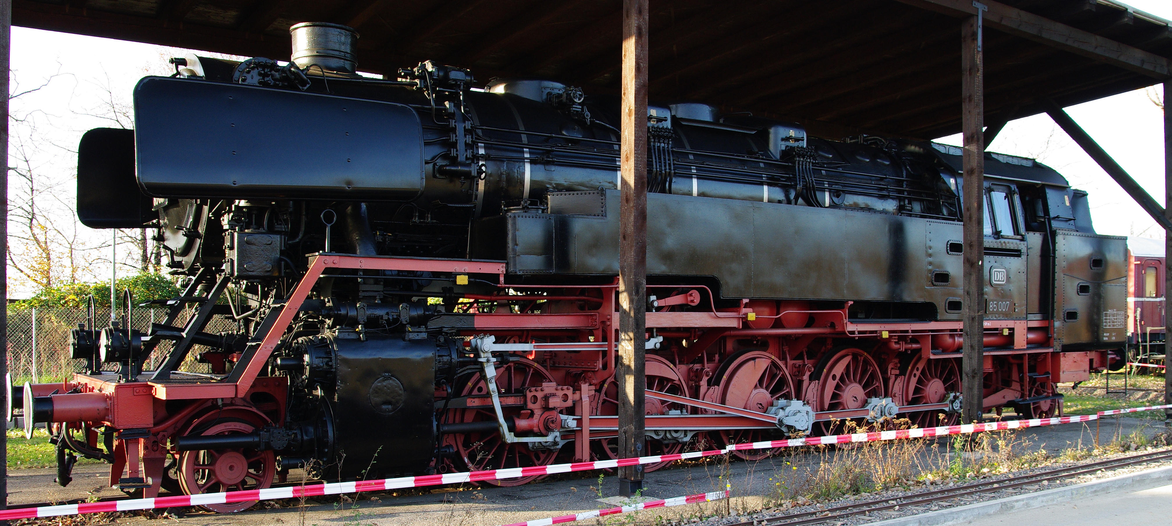 Bilder der Lokomotive 007 Baureihe 85 die im Besitz der Stadt Freiburg und auf der Höllentalbahn gefahren ist